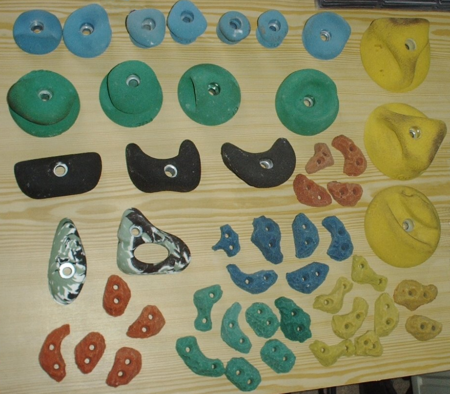 Diverse Klettergriffe unterschiedlicher Hersteller